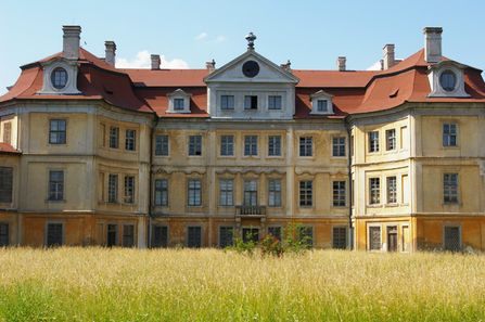 Zámek rodiny Lobkowicz v Hoříně u Mělníka.